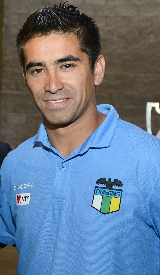 13-12-2013 Visita al plantel del Club Deportivo O"Higgins de Rancagua